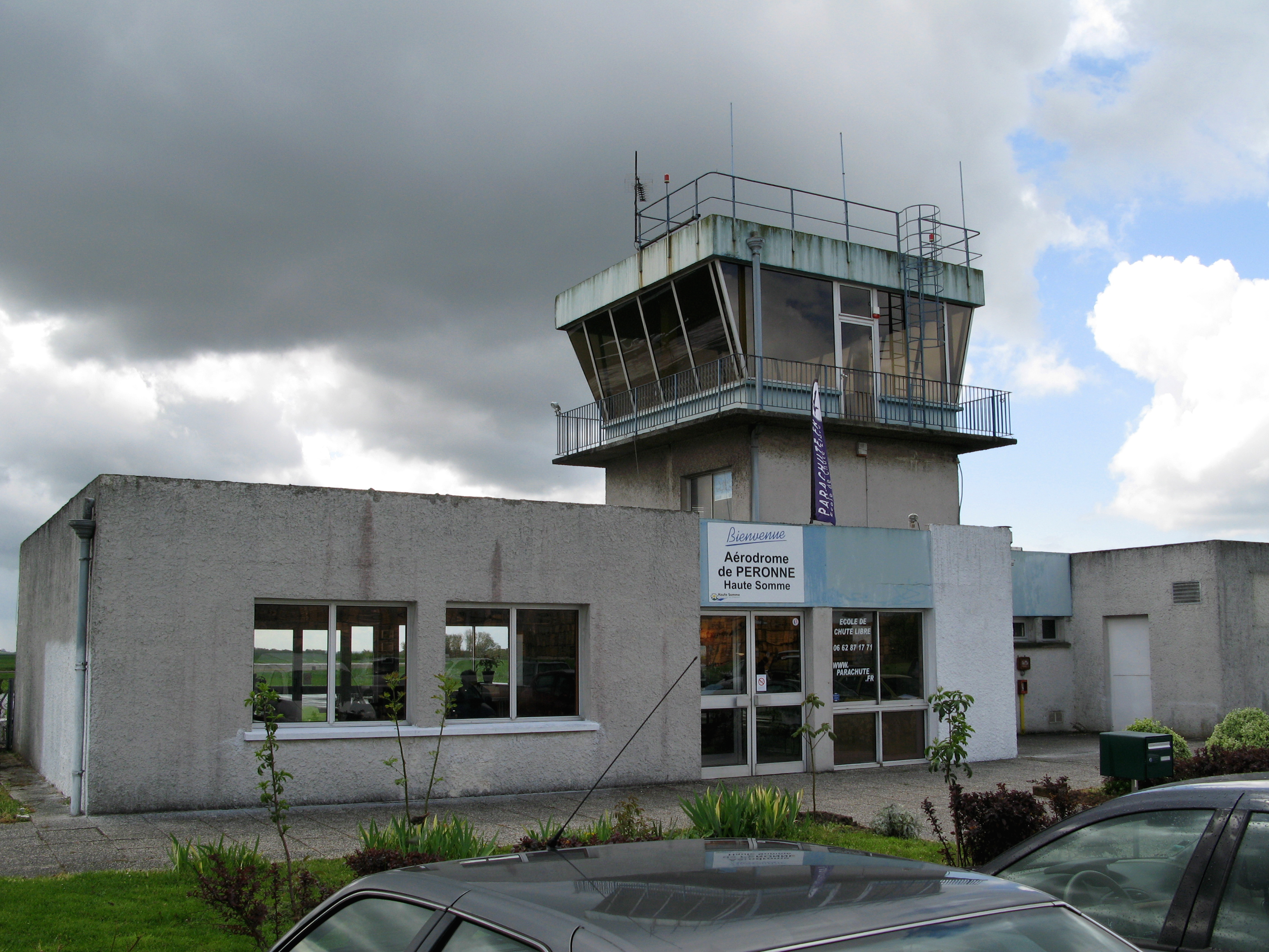 Estrées-Mons (Somme, France) - La tour de contrôle de l'aérodrome de Péronne - Haute-Somme. . .